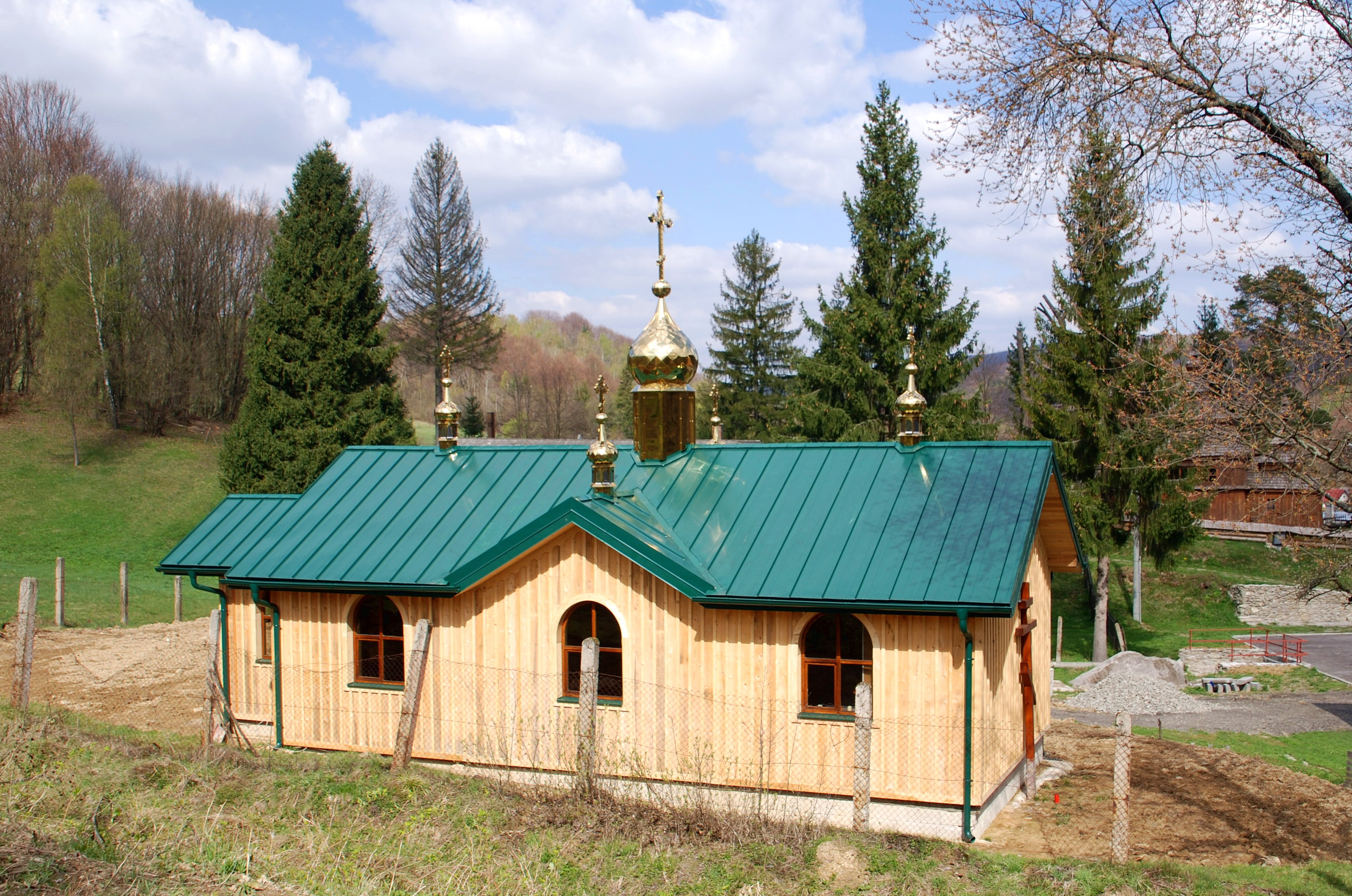 wieś Bodružal